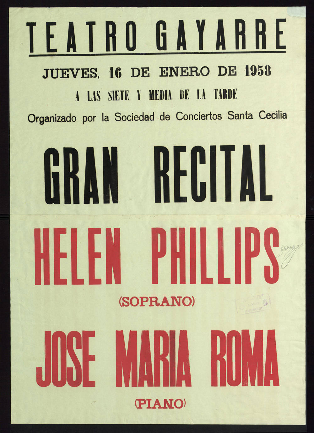 Cartell tipogràfic d'un concert de Helen Phillips i Josep Maria Roma al Teatro Gayarre el 16 de gener de 1958.